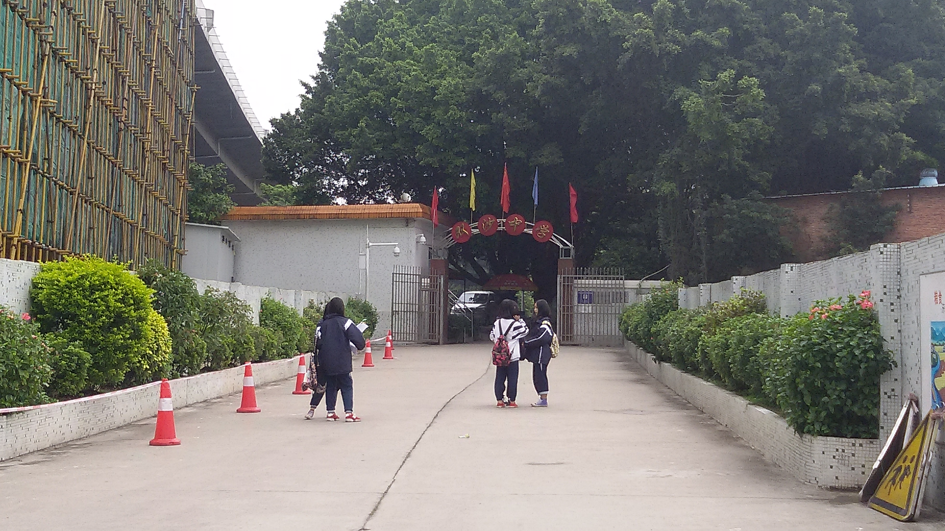 粵語: 黃埔區雙沙中學嘅後門